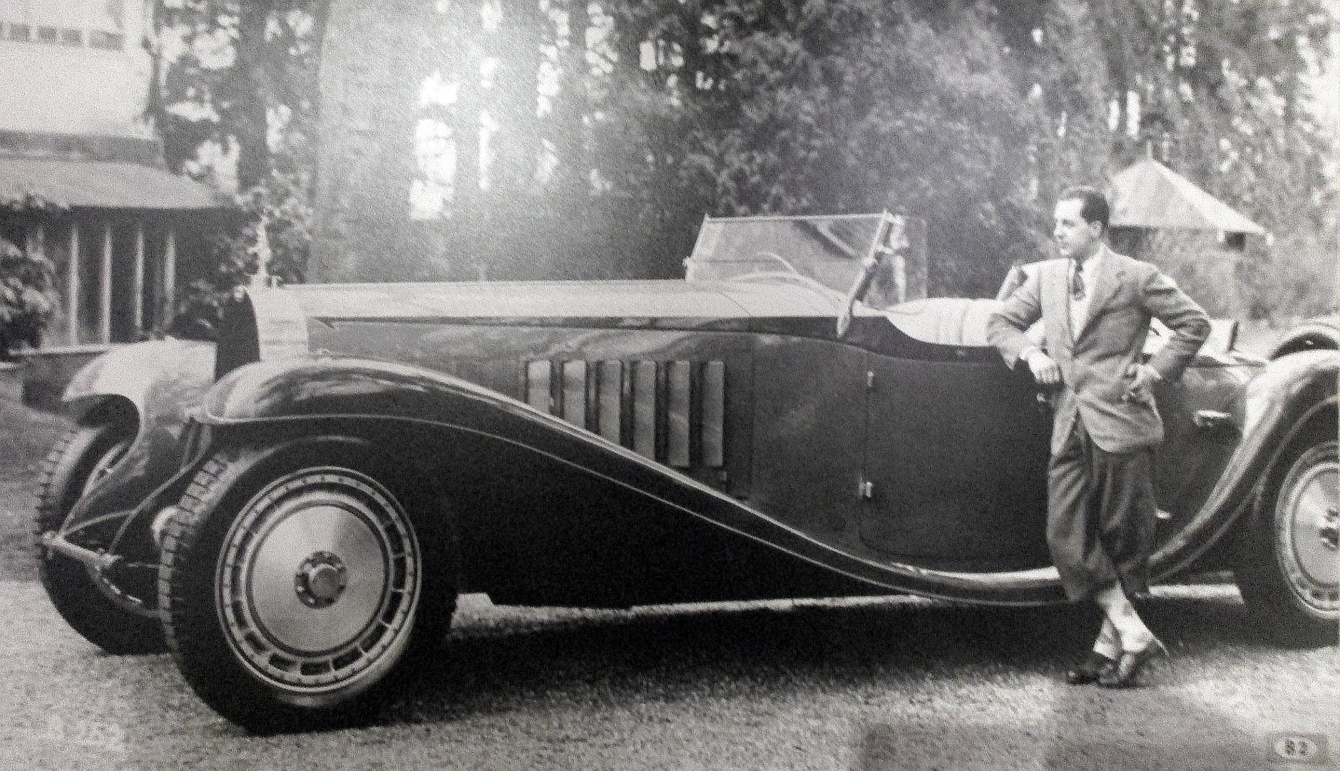 Jean Bugatti (1909-1939) devant une Bugatti Royaleroadster Type 41. Usine Bugatti de Molsheim Photo du Musée Bugatti Molsheim